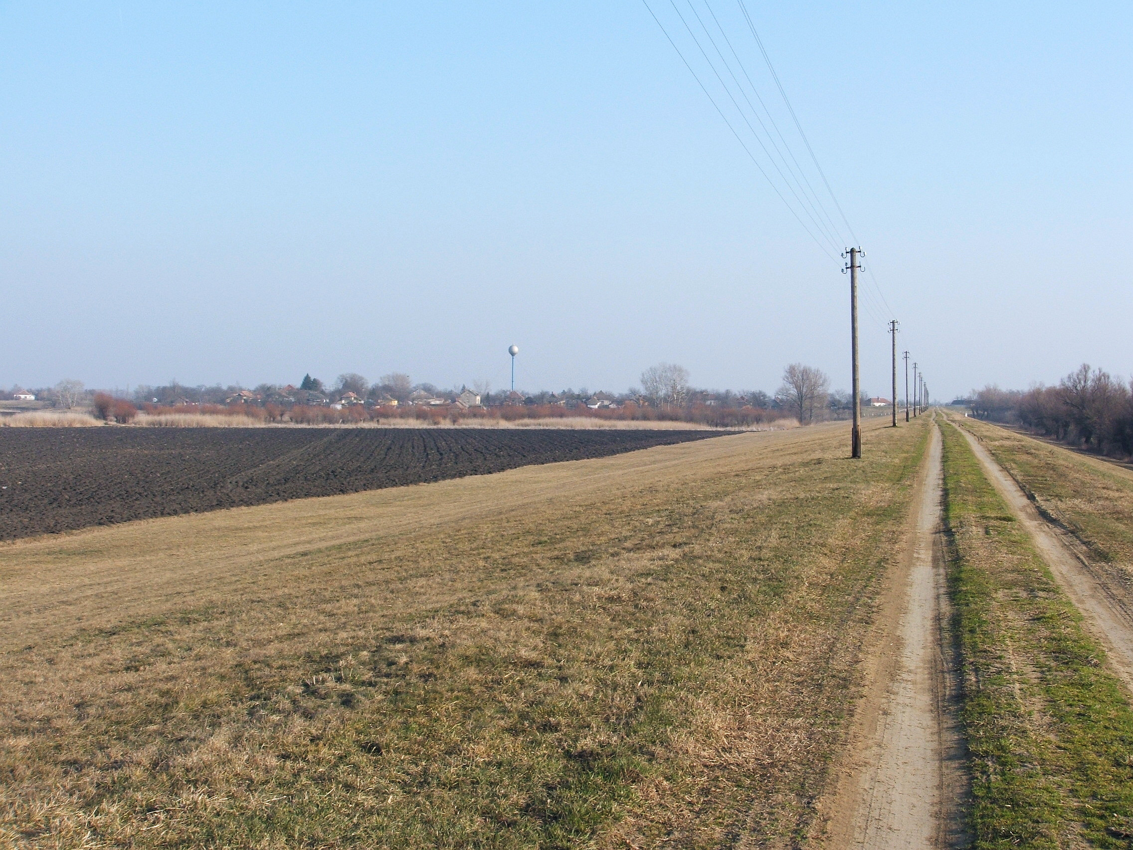 Magyartés (Szentes része) látképe a Hármas-Körös gátjáról